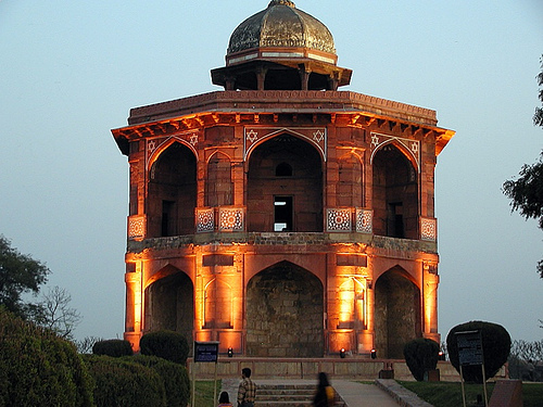 Vestige de Dilli Sher SHahi, ancienne ville de Delhi